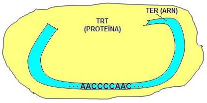 Imagen telomerasa